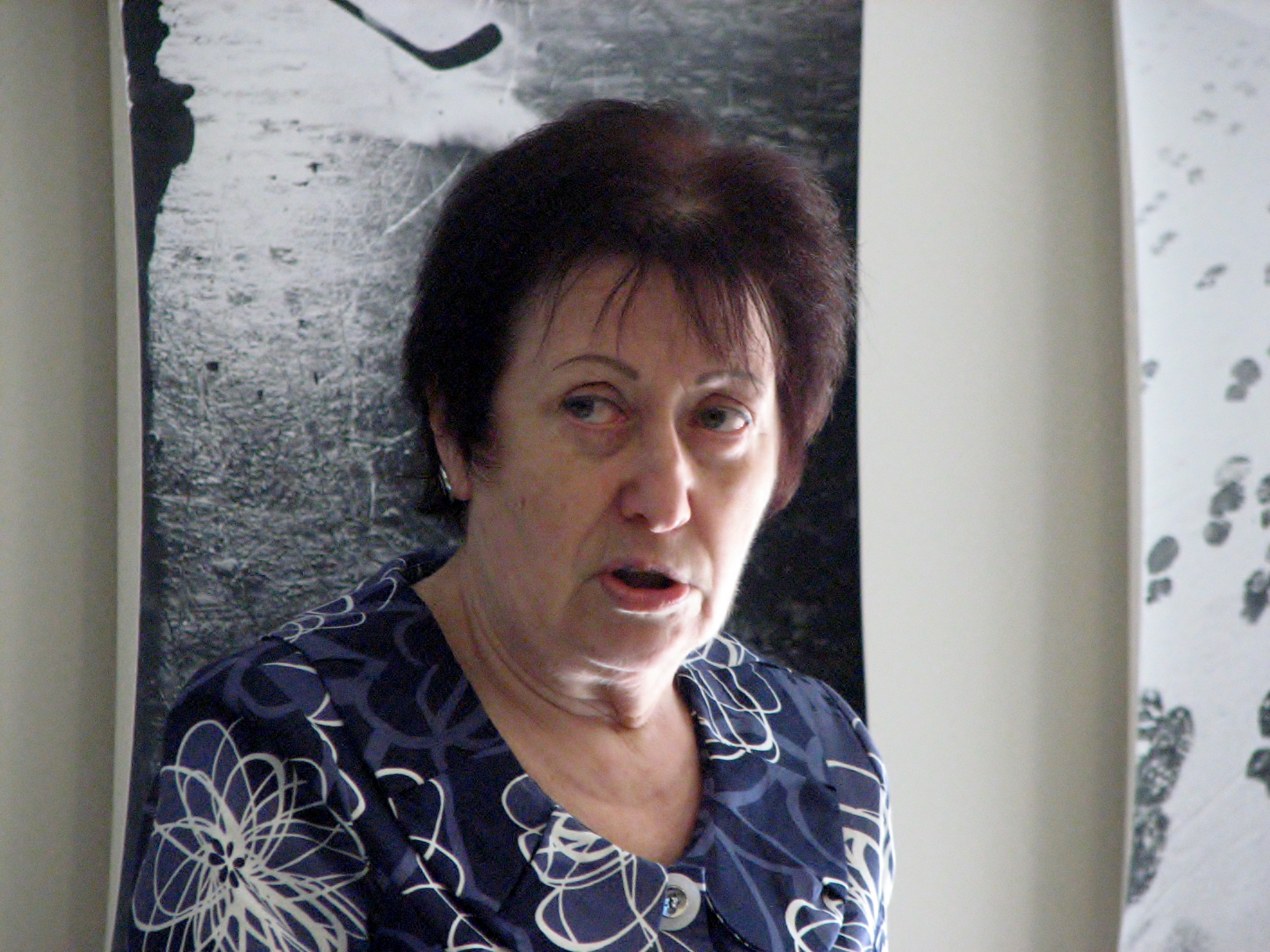 Tallinna Ülikooli vene kirjanduse professor Irina Belobrovtseva pidamas loengut "Meister ja Margarita" teemal Tallinna Keskraamatukogu võõrkeelse kirjanduse osakonnas